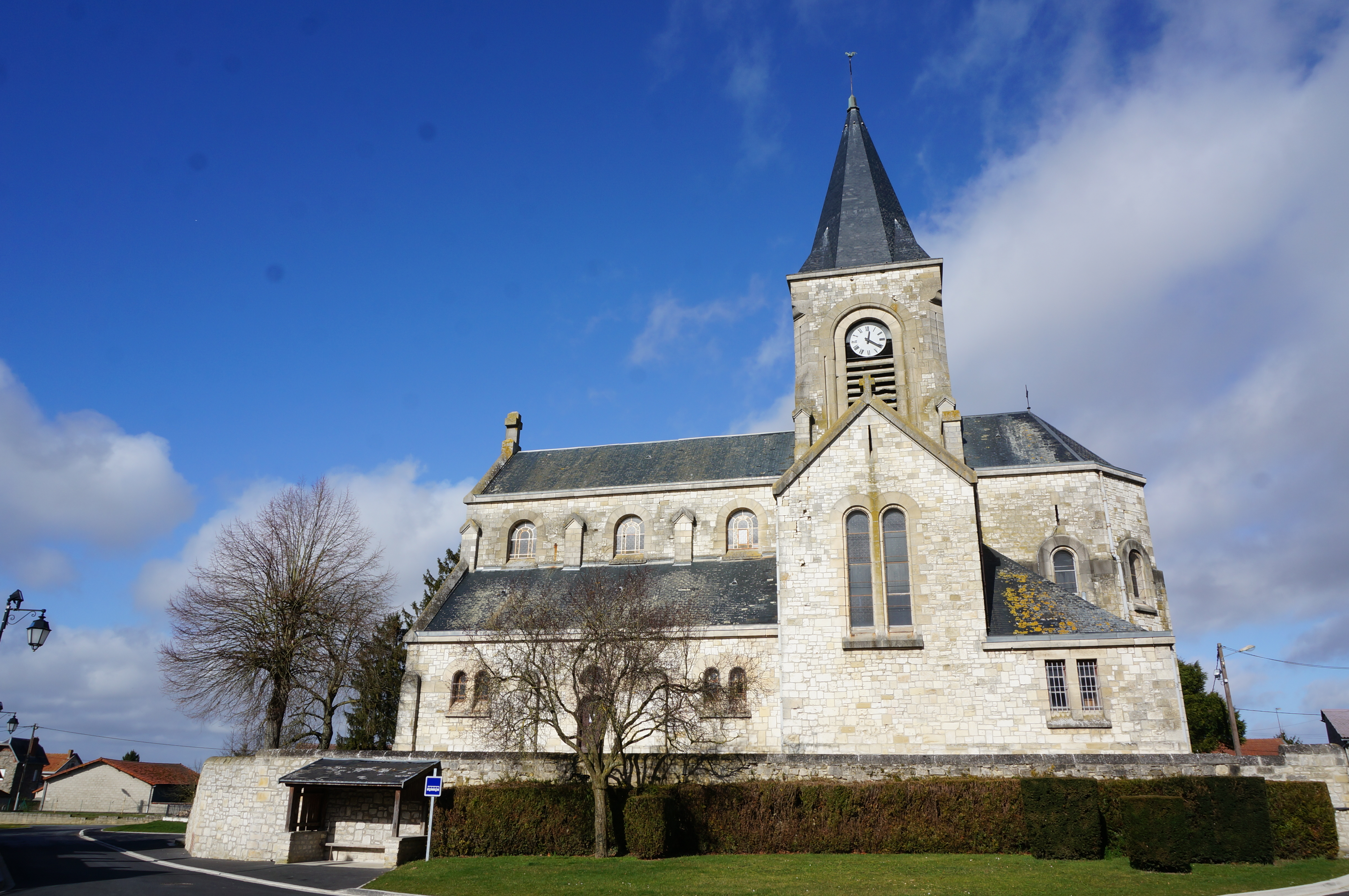 vue de Prouvais.